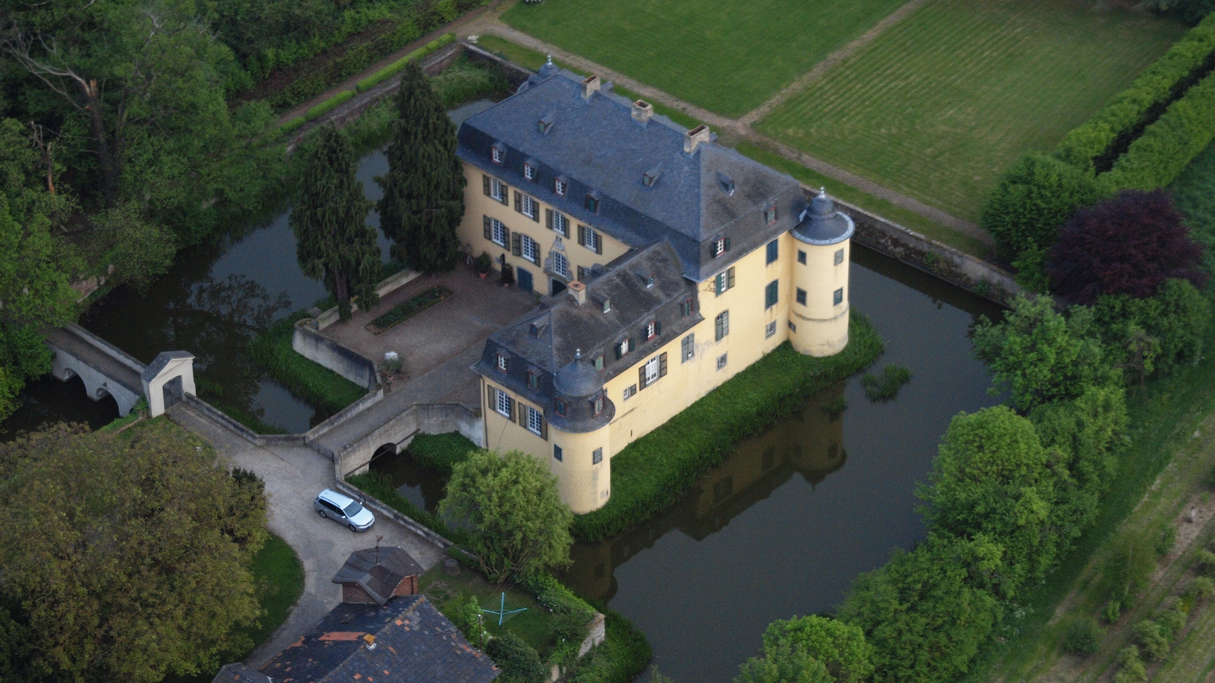 Burg Lüftelberg: Luftaufnahme